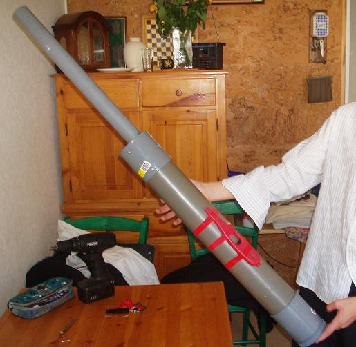 Photo de patator à combustion, prise par mes soins (libre de droits), présente sur